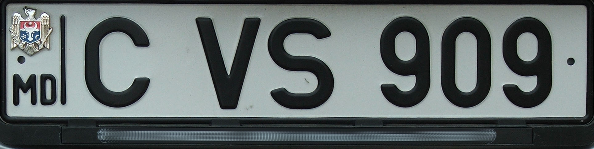 Moldovan registration plate as seen in 2007.